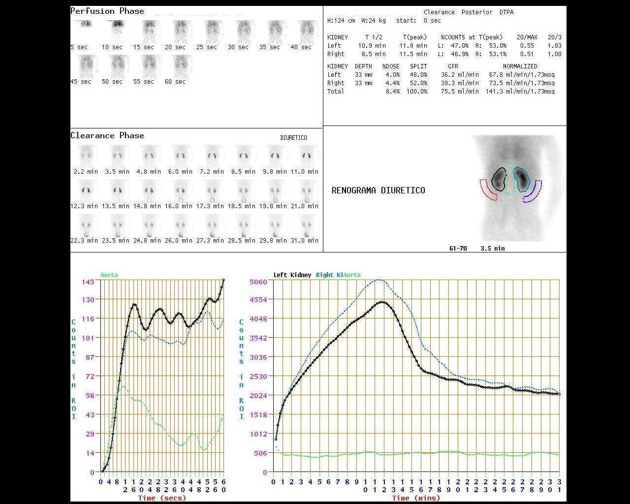 Renograma secuencial isotopico con 99m-Tc-DTPA,+ estimulo diuretico, existe dilatacion ureteral bilateral y reflujo vesico-ureteral izquierdo.